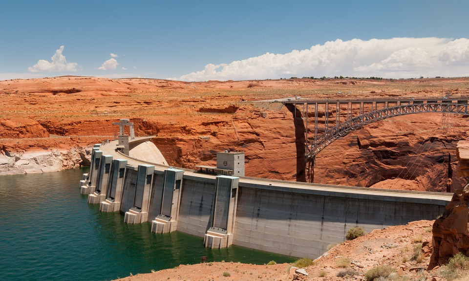 Barrage de Glen Canyon aux Etat-Unis